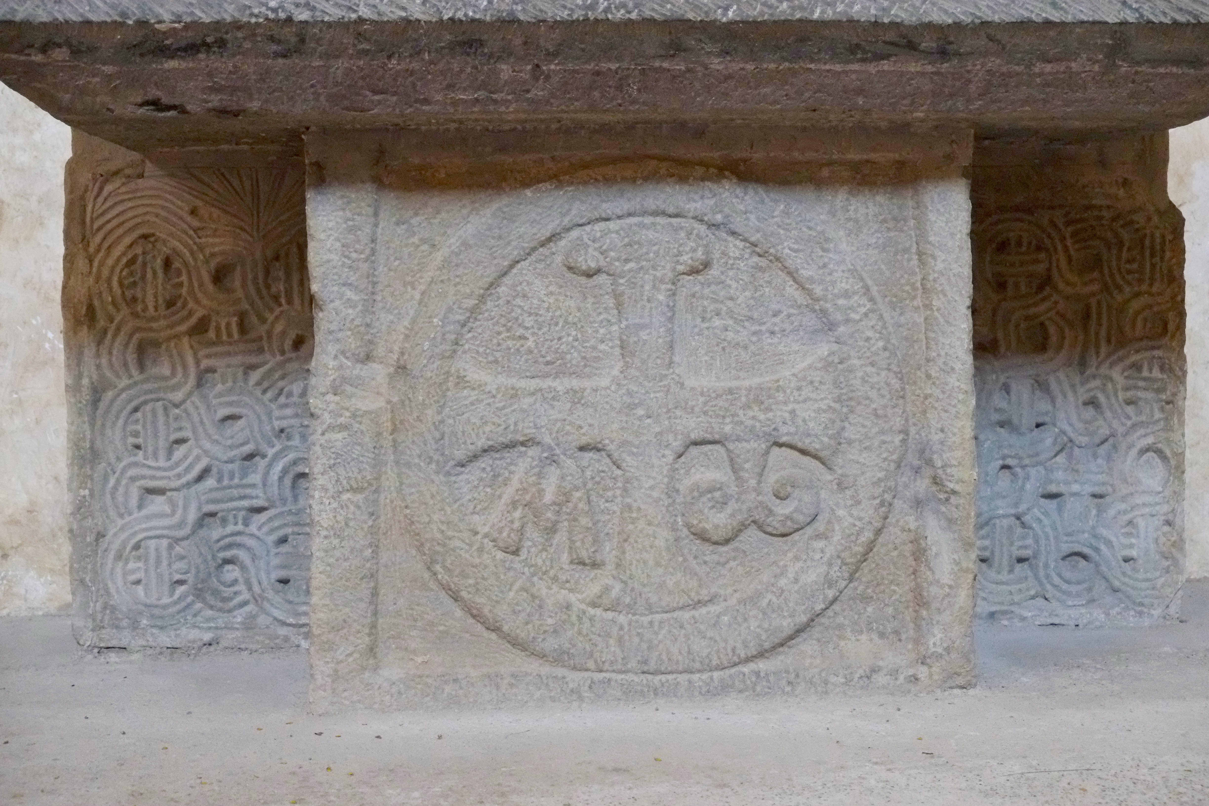 Kirche Saint-Polycarpe in Saint-Polycarpe (Aude) im Département Aude der Region Languedoc-Roussillon (Frankreich)